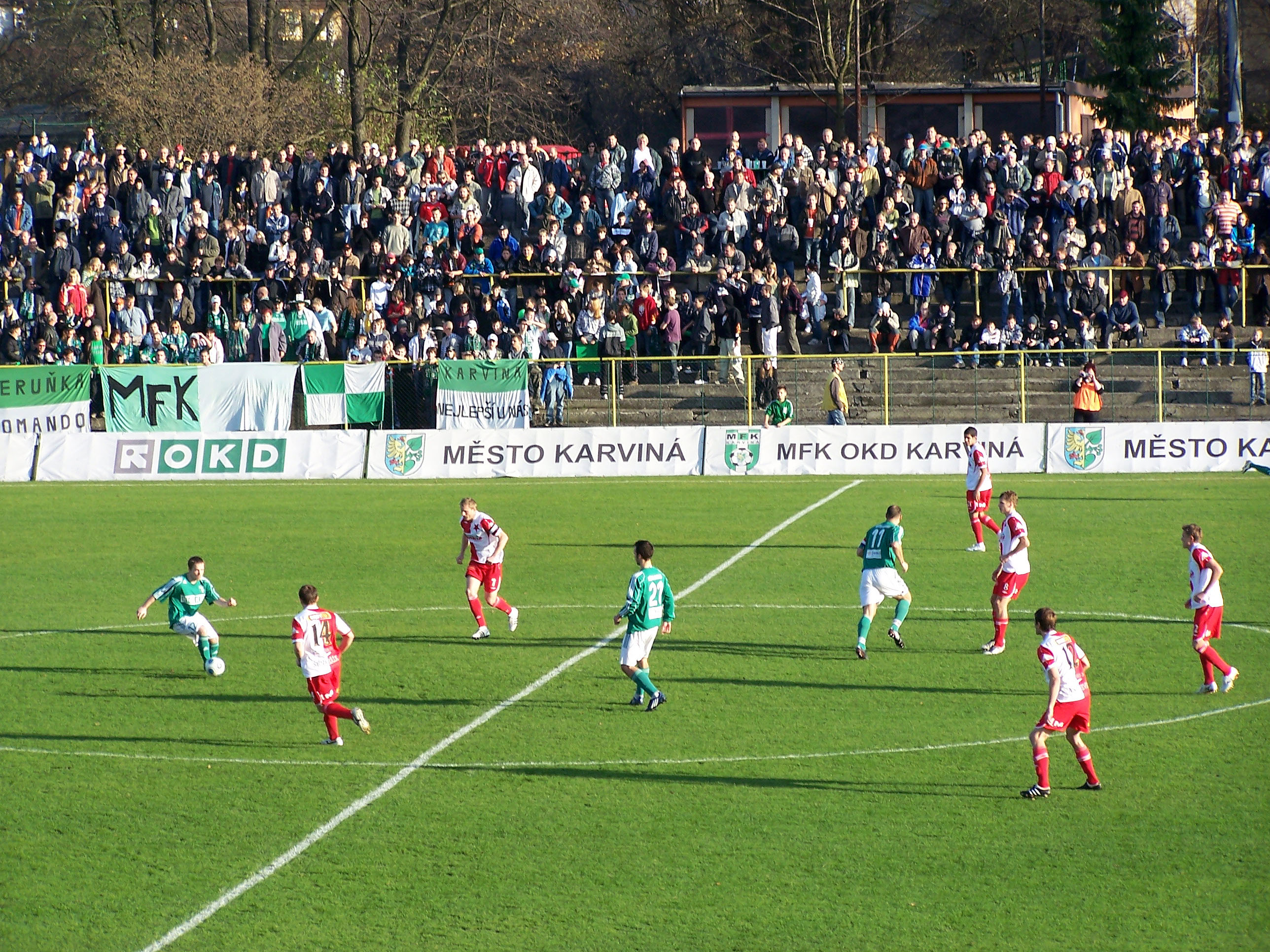 MFK Karviná - SK Slavia Praha ČMFS Cup match in Karviná